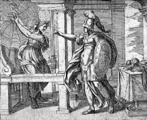 Gravure issue d'une série d'illustration des Métamorphoses d'Ovide.